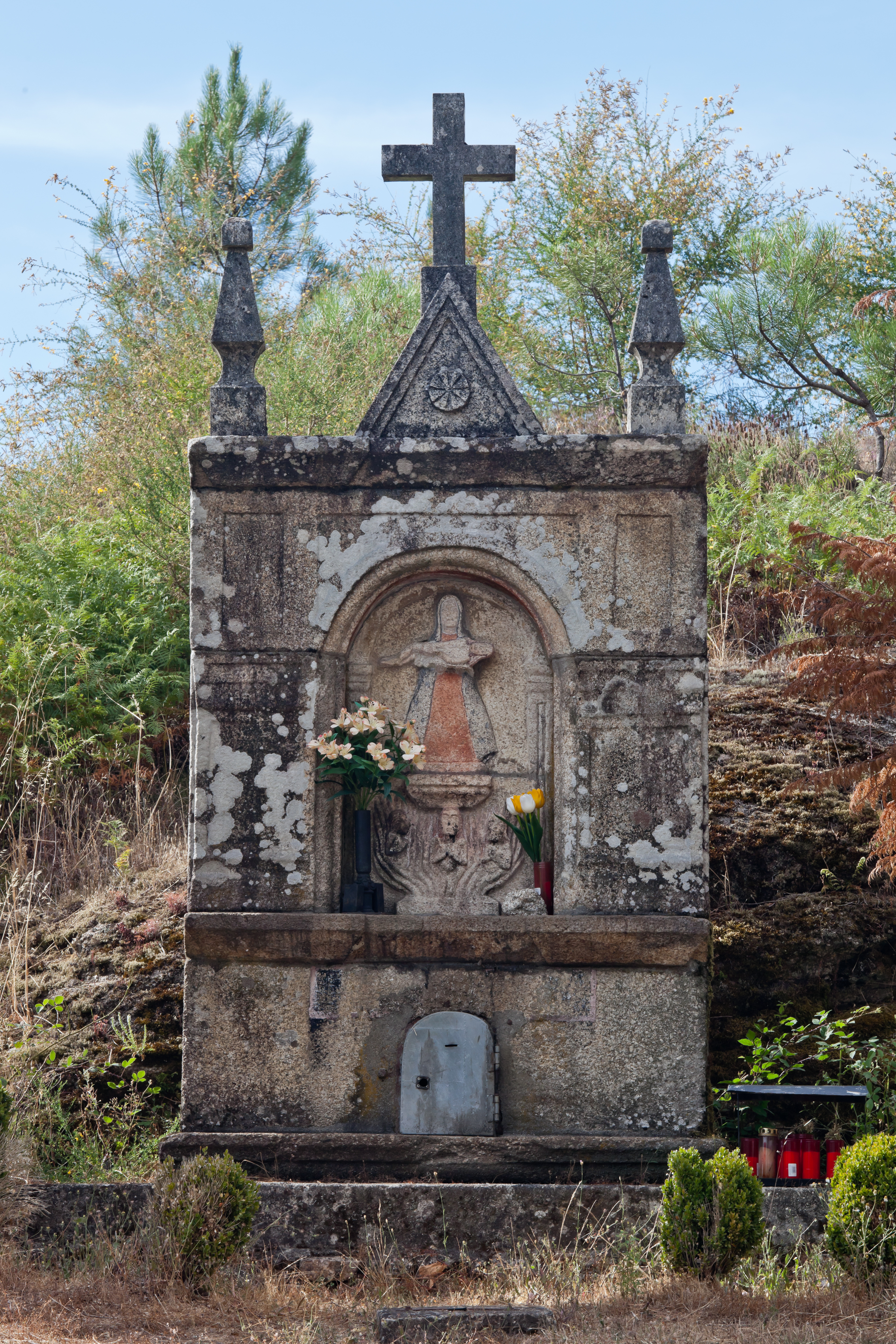 A Arnoia - Peto de ánimas - Galiza